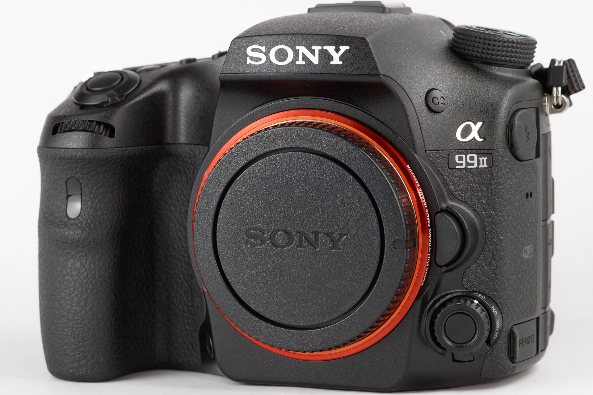 3代目 SONY Aマウント 35mmフルサイズ フラッグシップ機